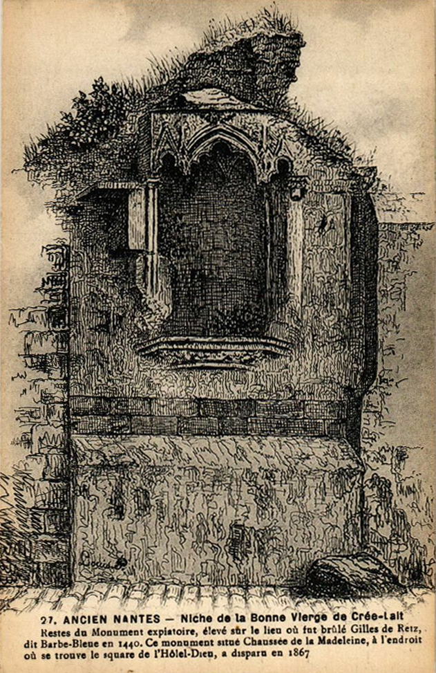 Vieux Nantes, niche de la Bonne Vierge de Crée-Lait.